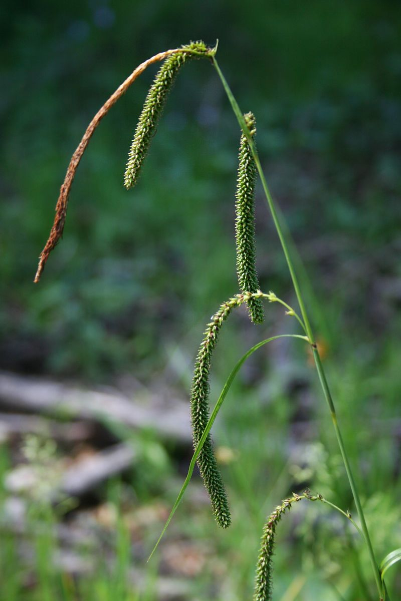 Hänge-Segge (Carex pendula), Sauergräser (Cyperaceae) - Österreich/Austria/Autriche: Oberösterreich, Hausruckviertel, ca. 2.6 km NE Forsthaus Redltal, ca. 680 m s.m.